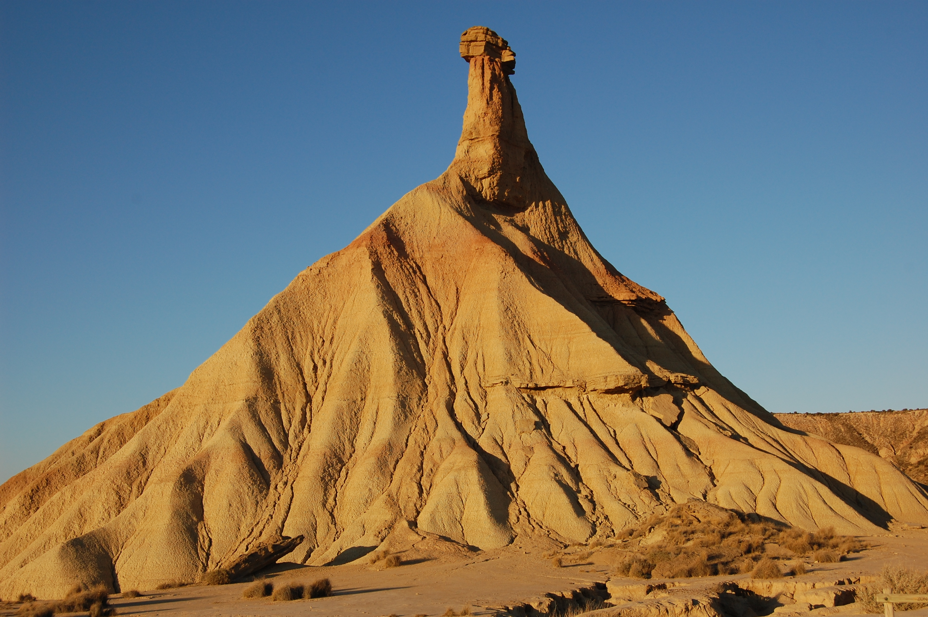 Parque Natural de Bardenas Reales